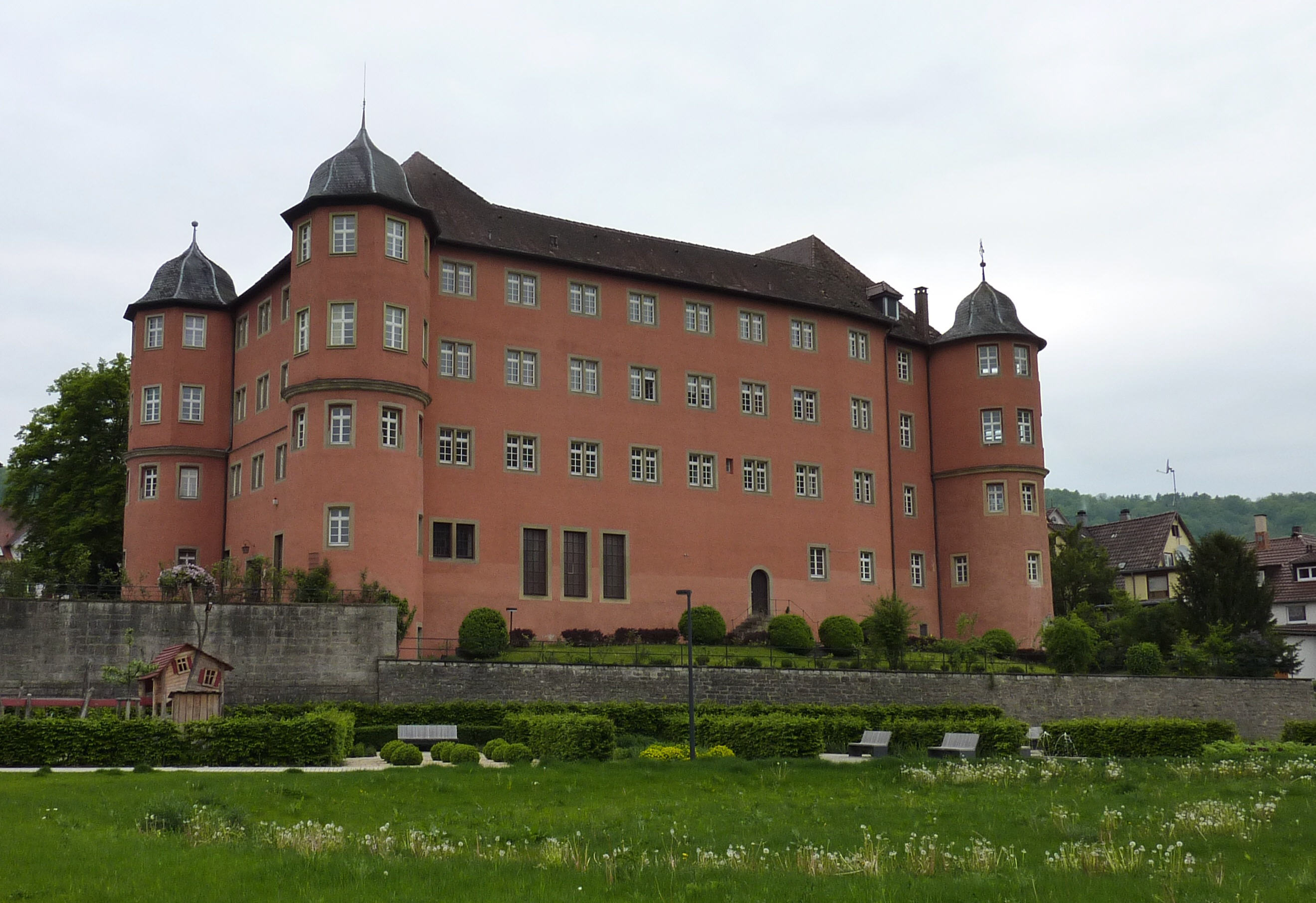 Schloss Künzelsau